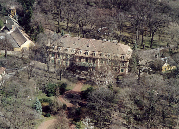 Palace - Derekegyháza - Hungary - Europe (Károlyi Mansion)